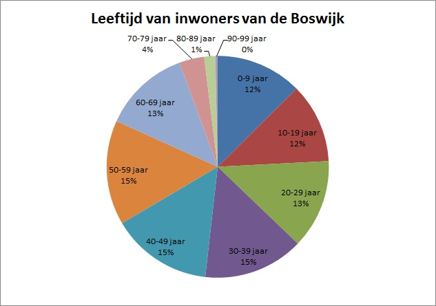 Informatie: (B09)